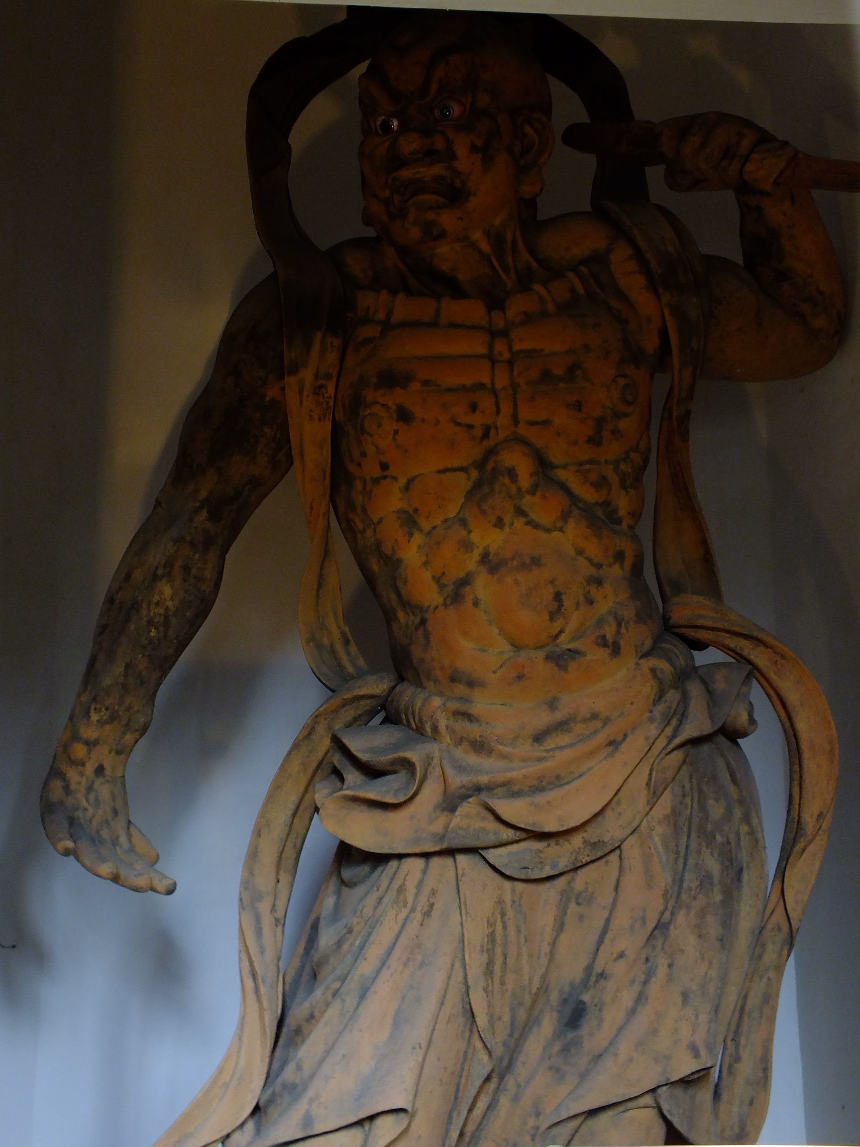 2014-11-24 Sekiganji 石龕寺